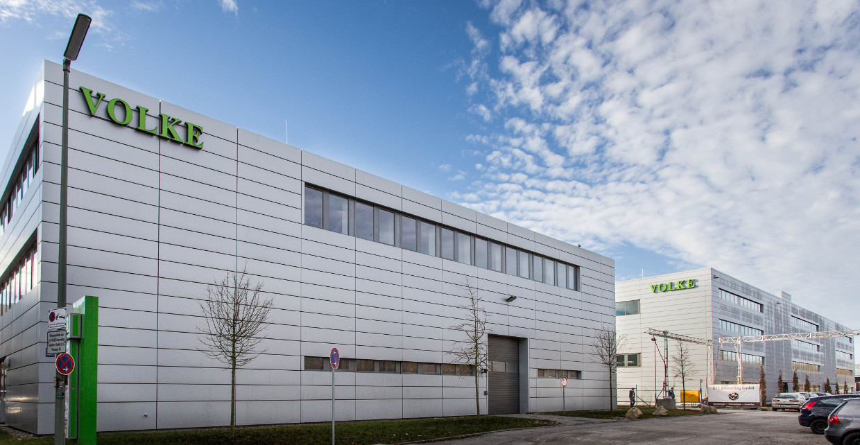 Gebäude der Volke Consulting Engineers GmbH & Co. Planungs KG